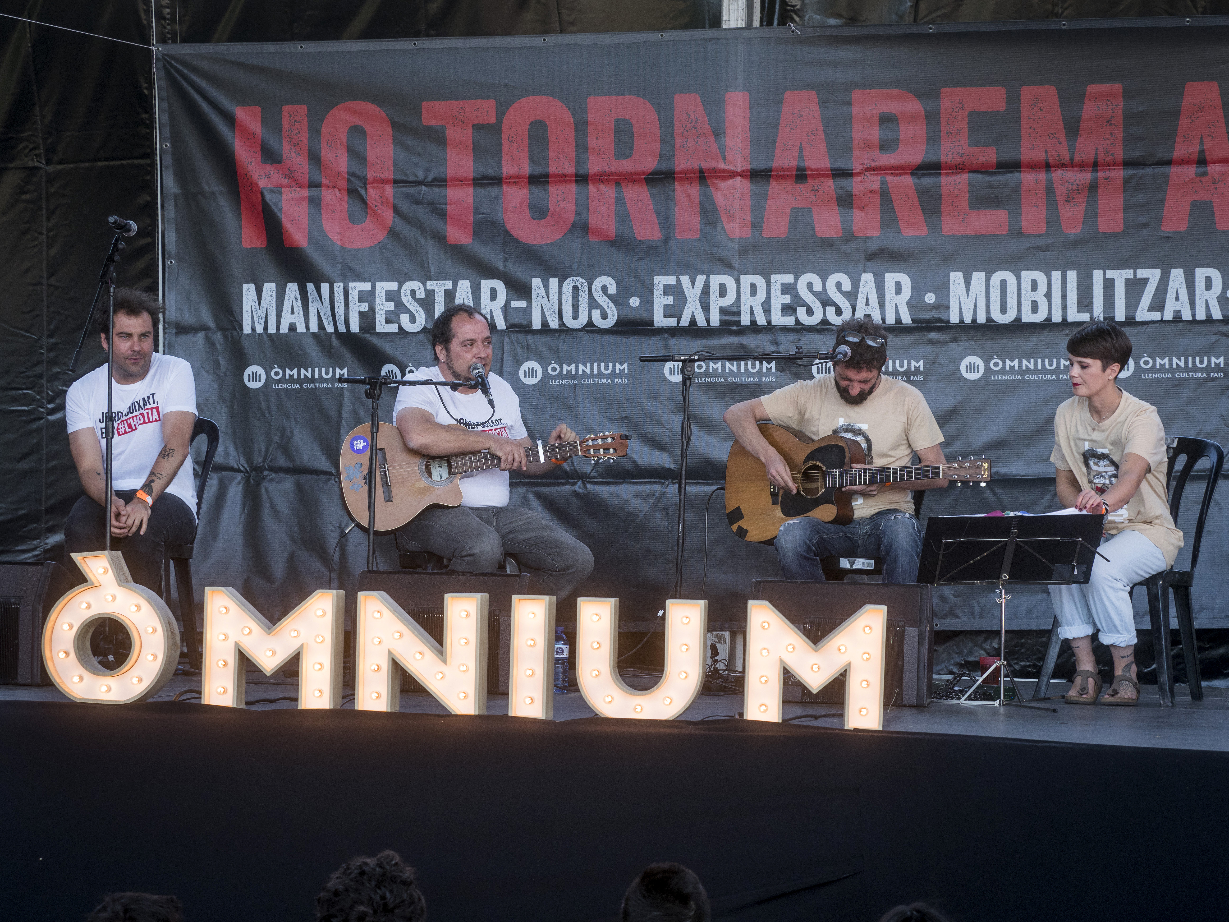 ©dani codina/Òmnium. Ovidi 4. El quartet format pel periodista i exdiputat de la CUP David Fernández, el poeta David Caño, el guitarrista Borja Penalba i la cantant Mireia Vives